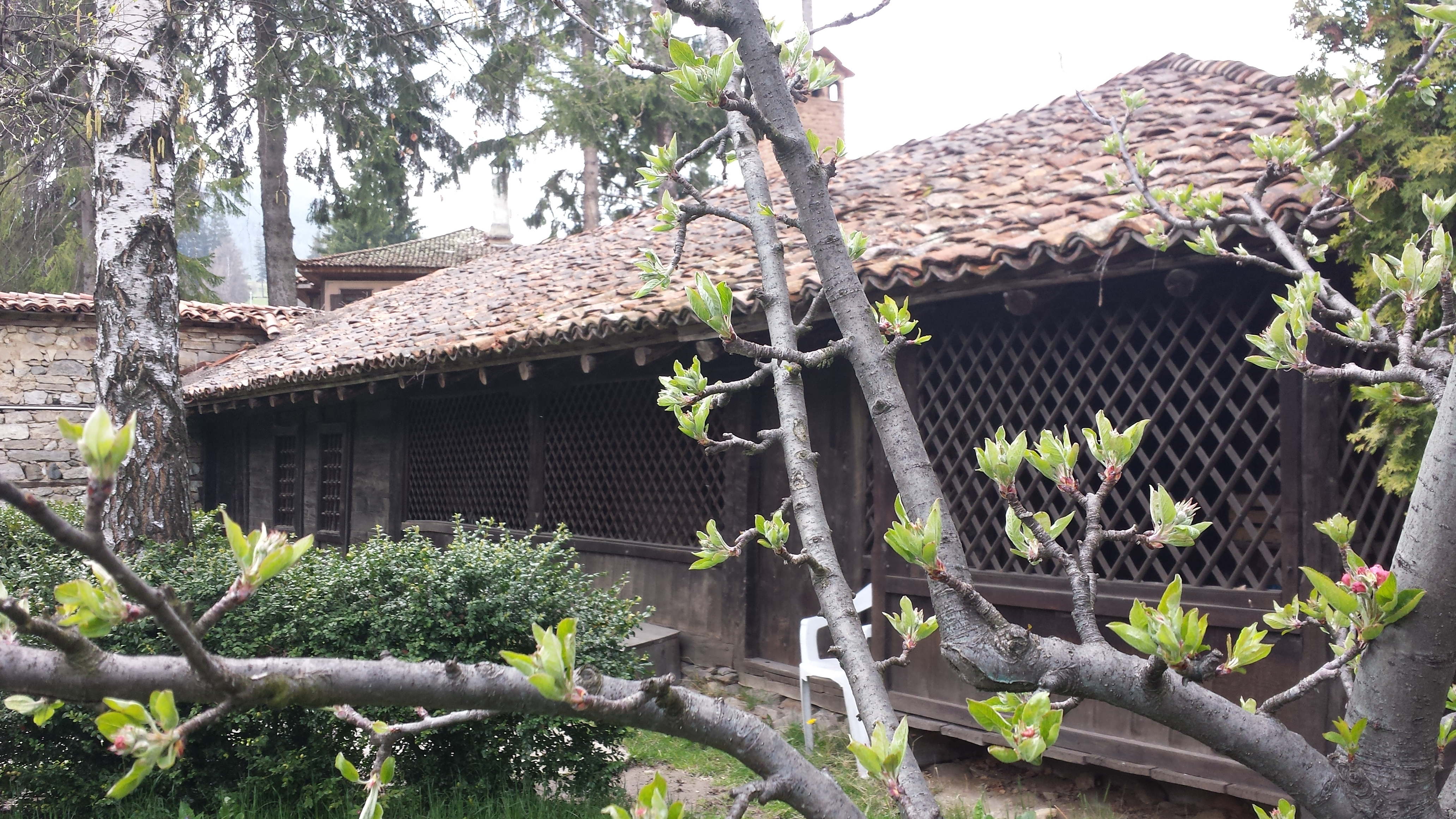 Павликянска къща